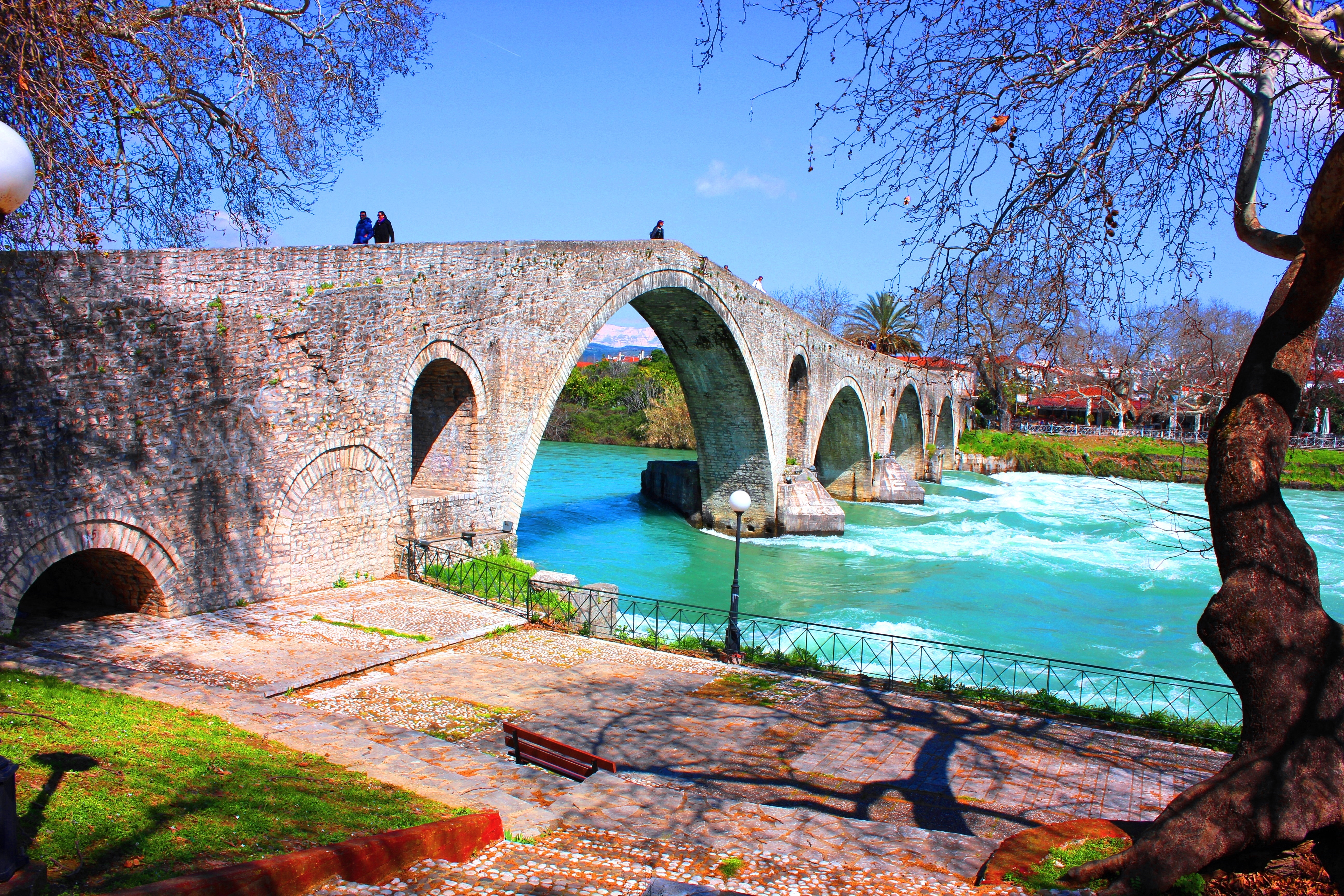 Arta, Bridge